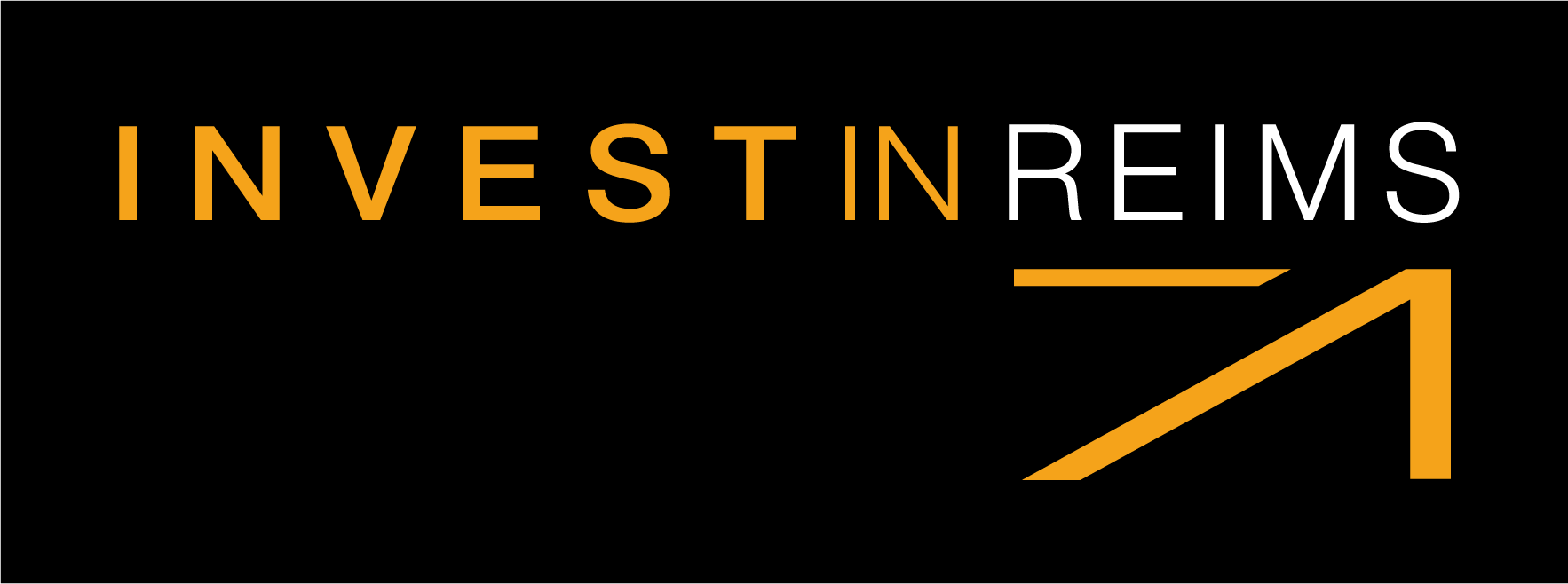 Logo Invest in Reims